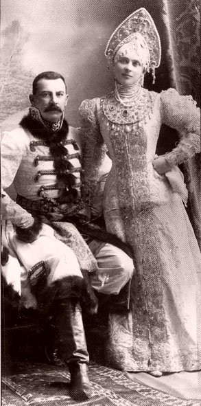 Зинаида и Феликс Юсуповы